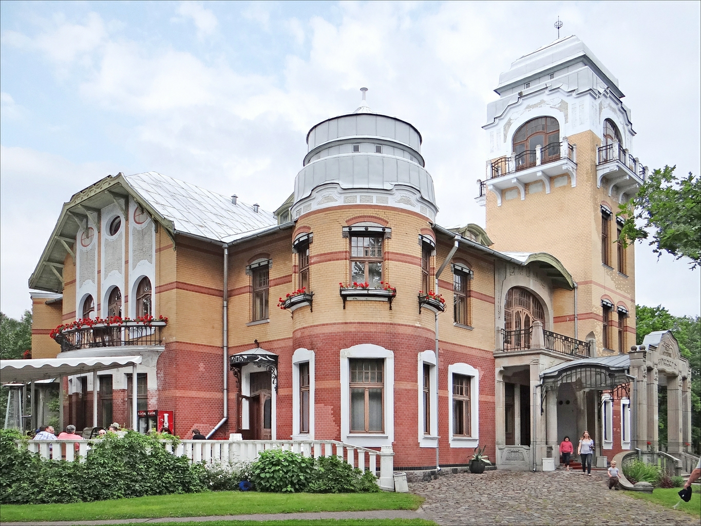 Vue d'ensemble de la villa Ammende